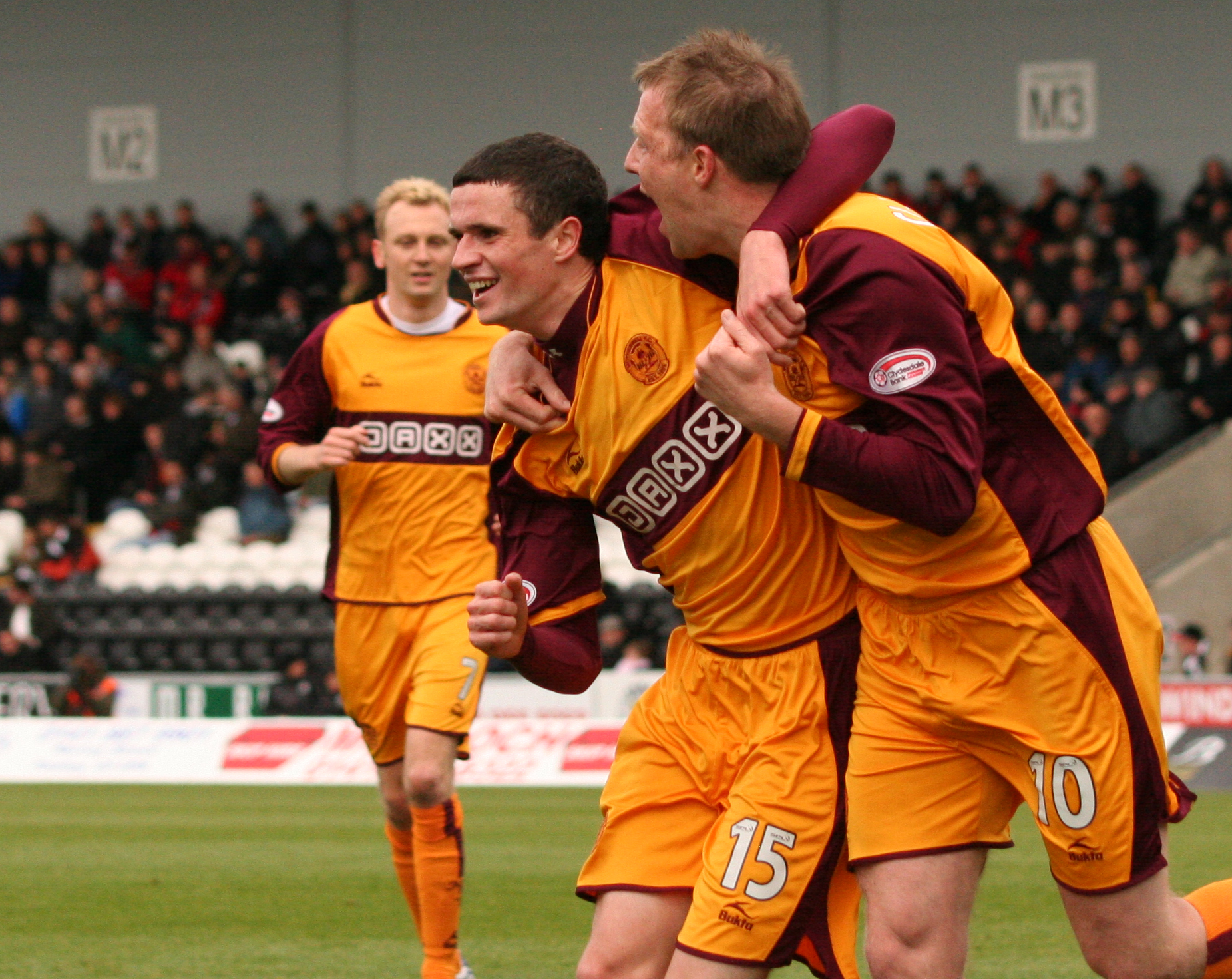 St Mirren vs Motherwell